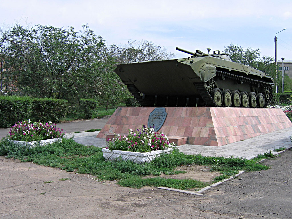 Мемориал "Черный тюльпан".